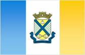 Drapeau de la municipalité de Benedito Novo - Brésil